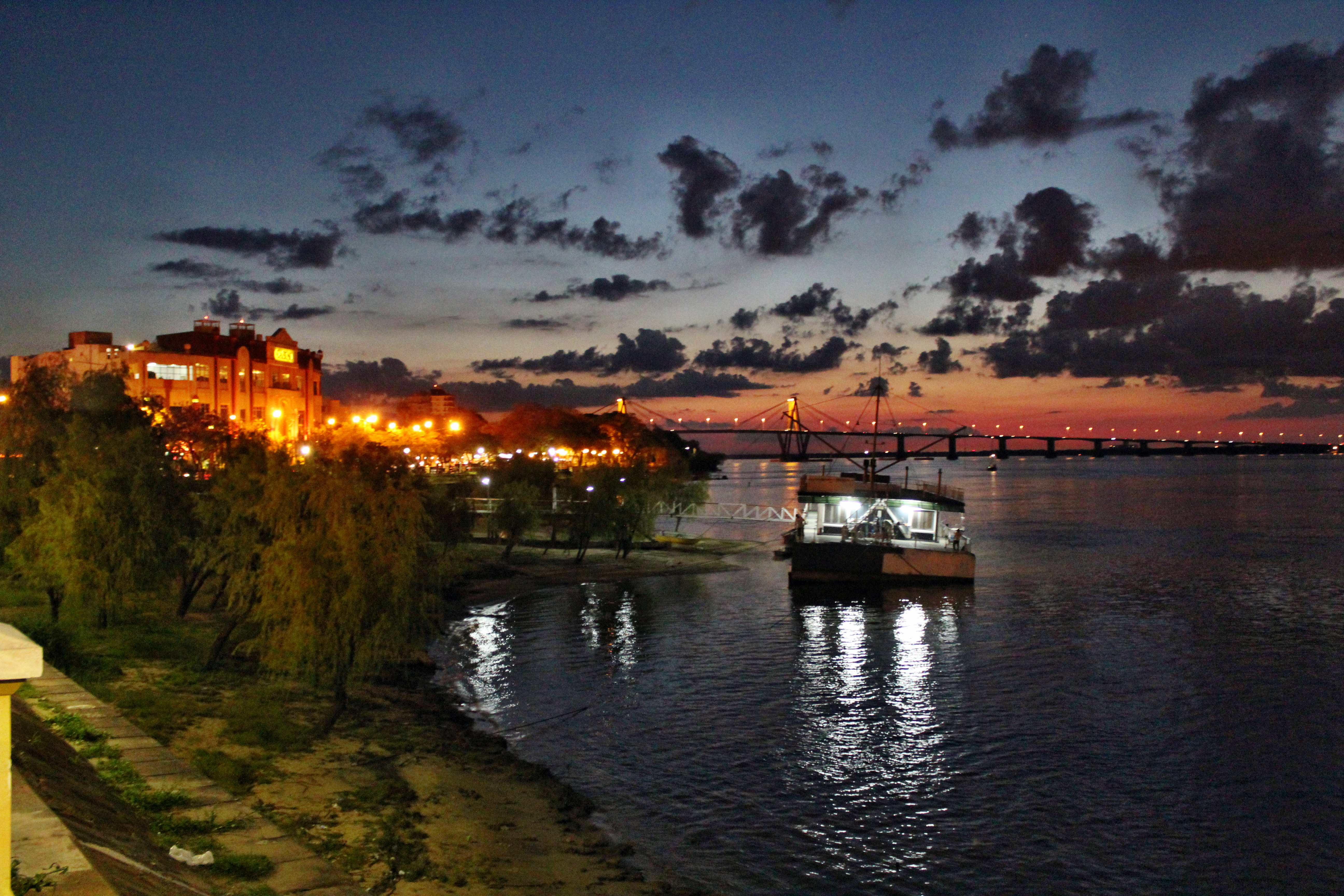 Corrientes, Capital